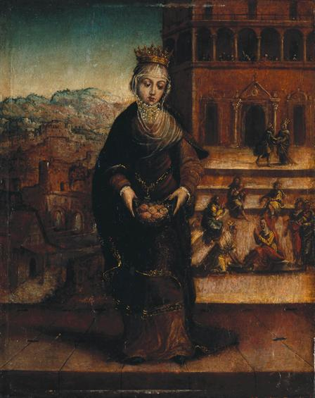 Rainha Santa Isabel de Aragon